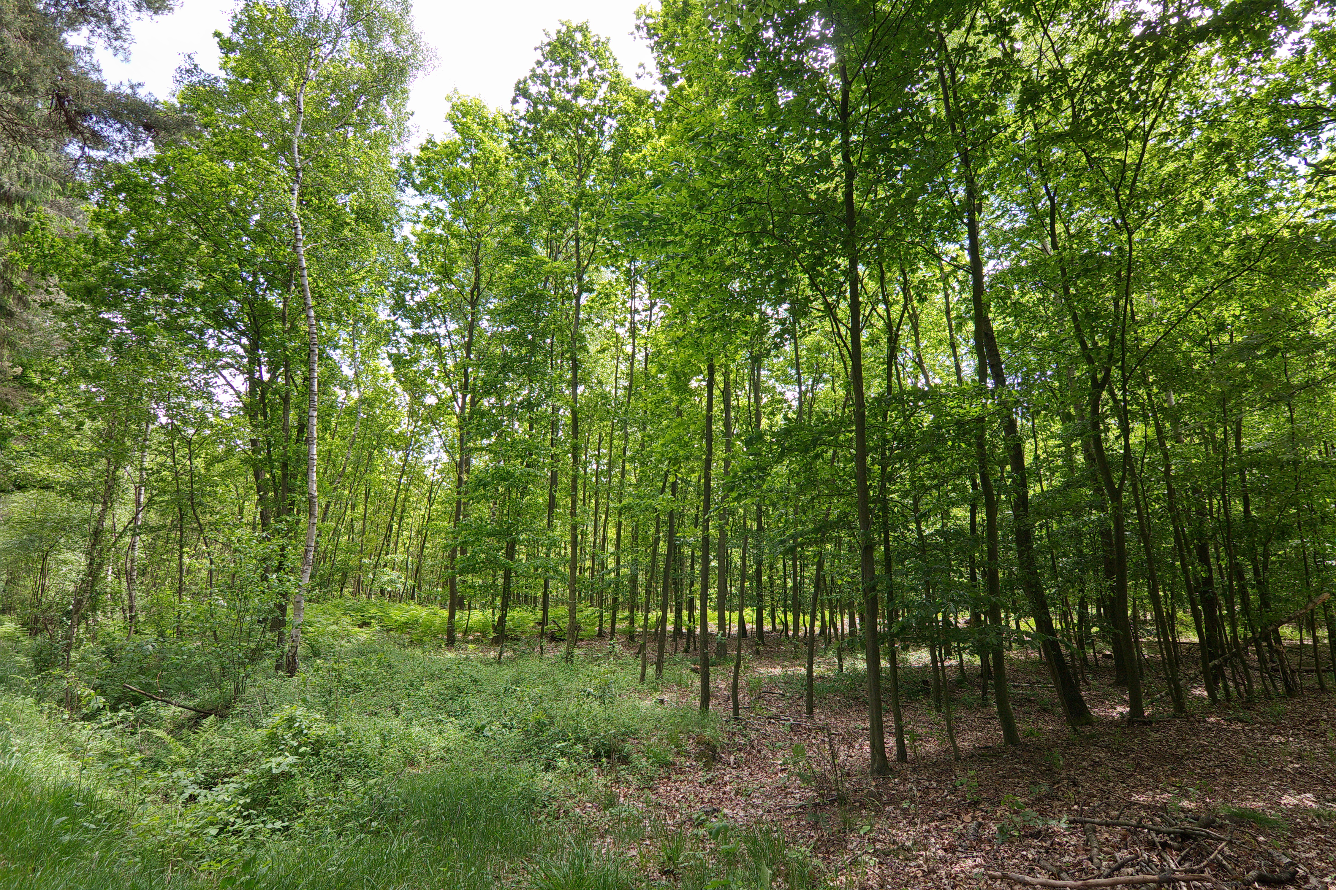 Naturschutzgebiet Schilfbruch im LSG Schilfbruch bei Altmerdingsen (Uetze), Niedersachsen, Deutschland